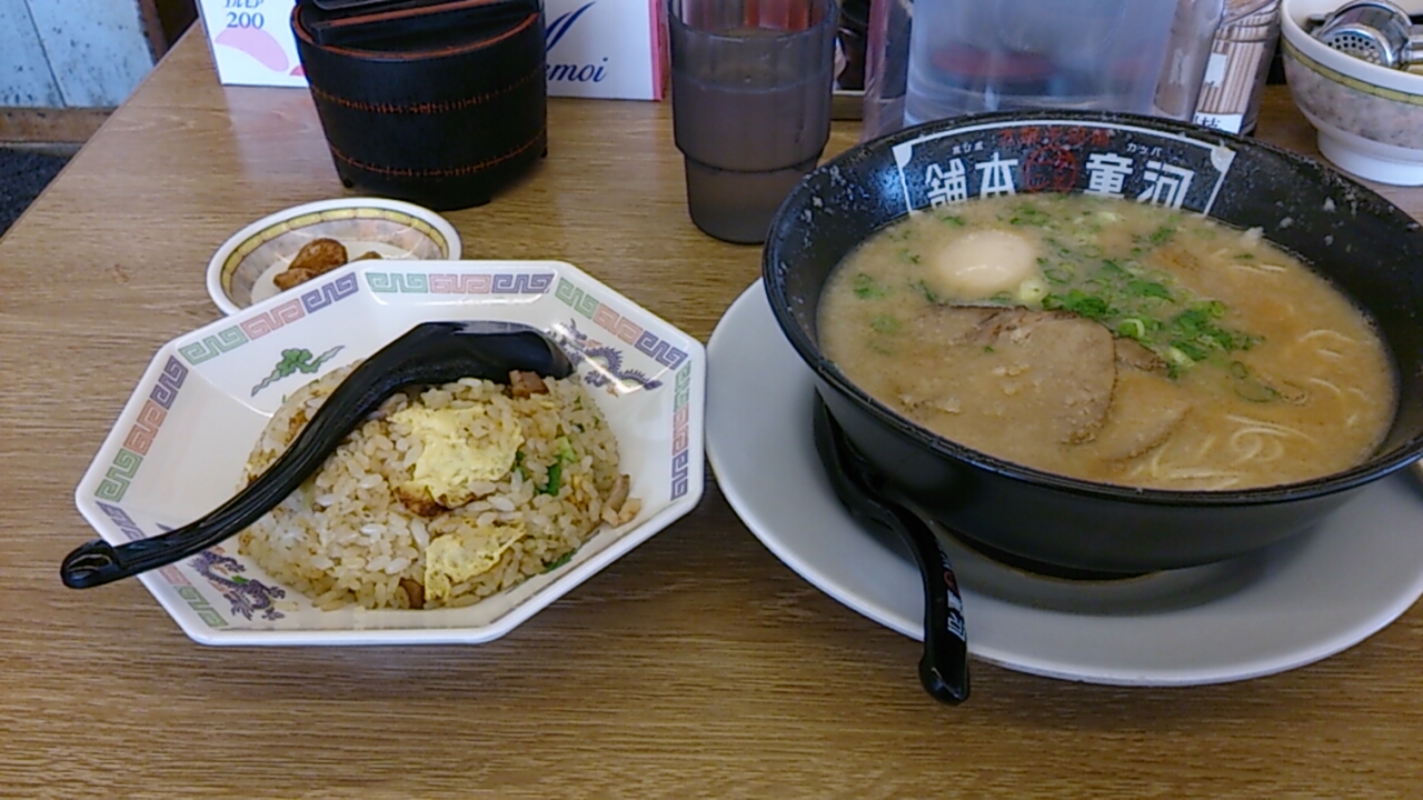 河童ラーメン本舗